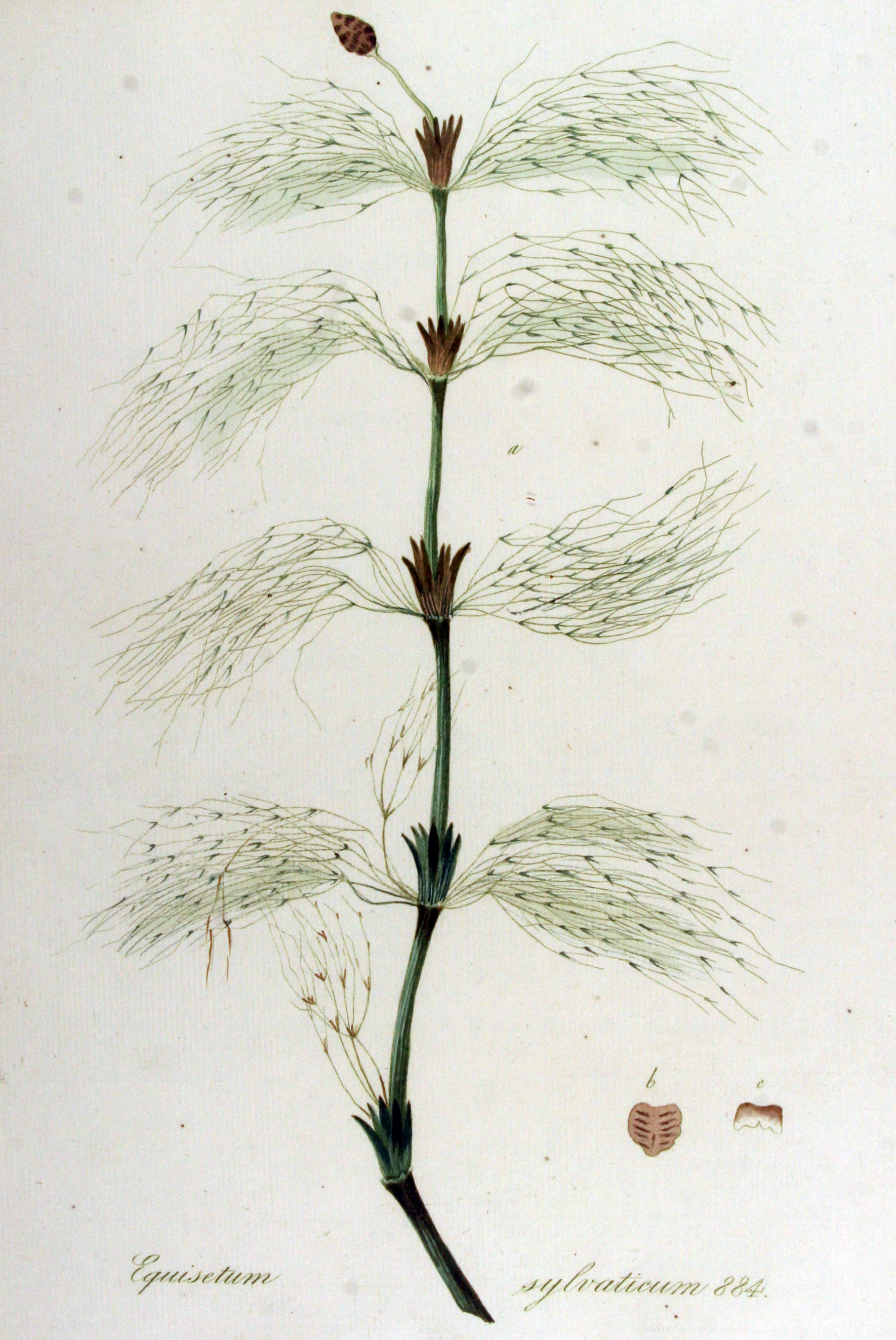 Equisetum sylvaticum L.